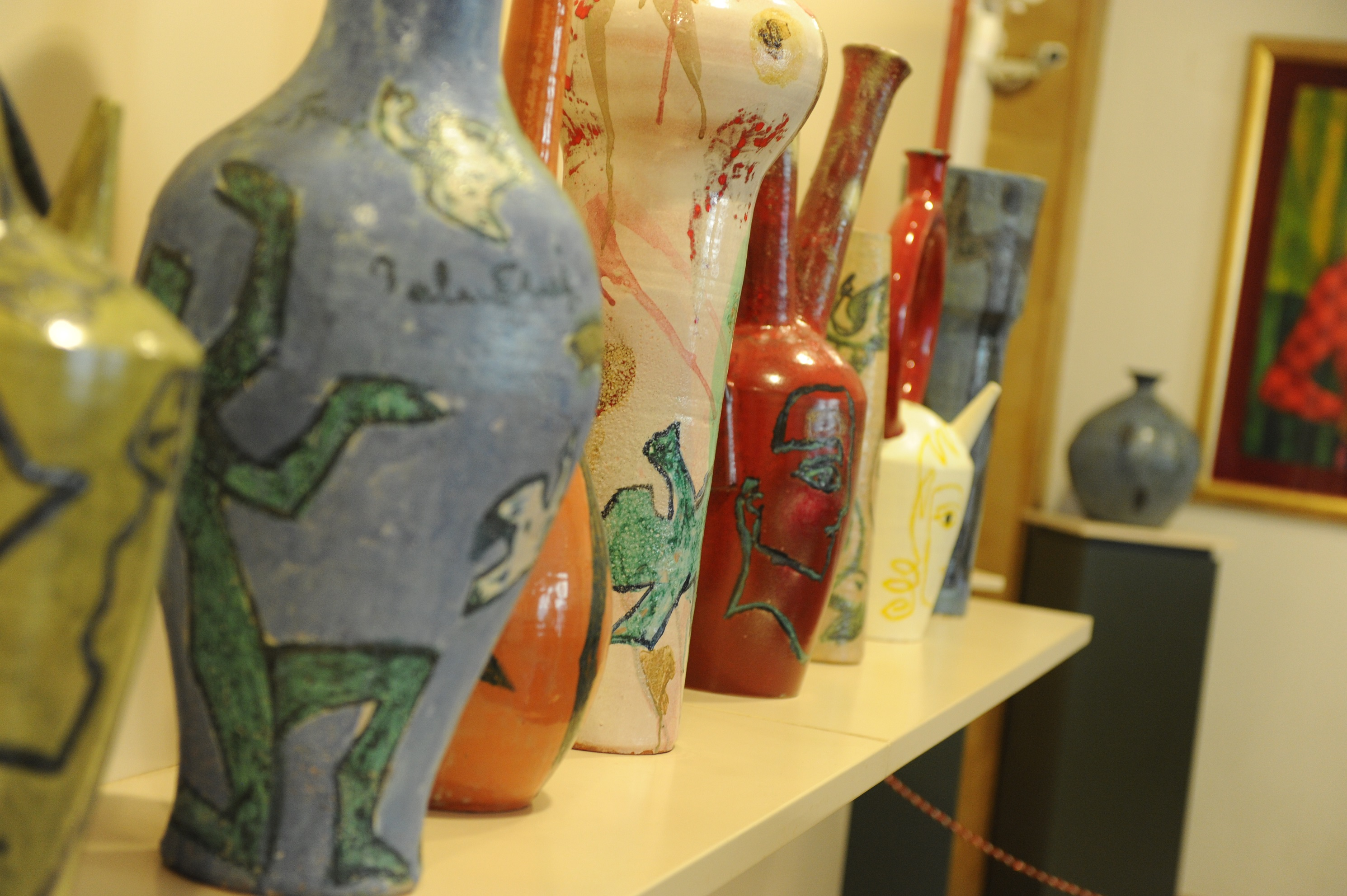 Obres ceràmiques de Palau Ferré del Museu d'Art Palau Ferré